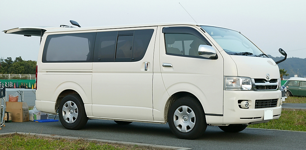 Toyota Hiace long van Super GL 2.5 turbo-diesel